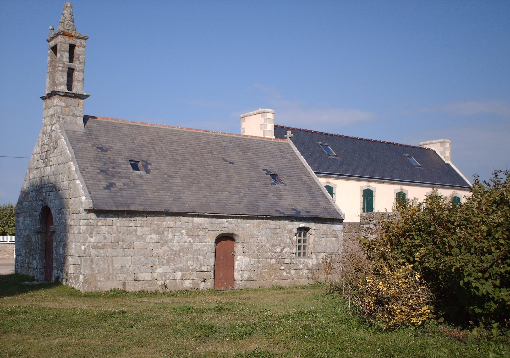 Chapelle Saint Yves à Plogoff (29)